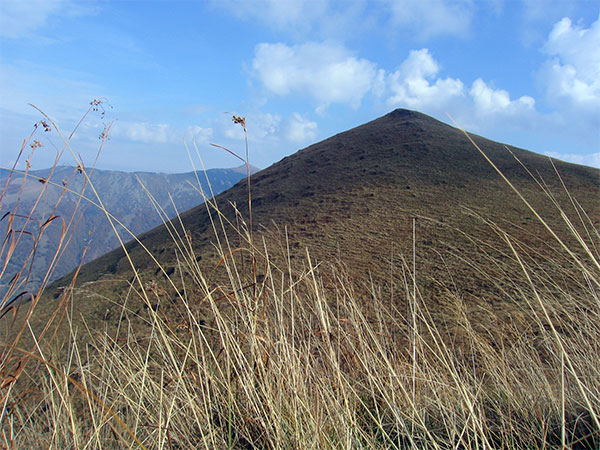 Stara planina - Midzor